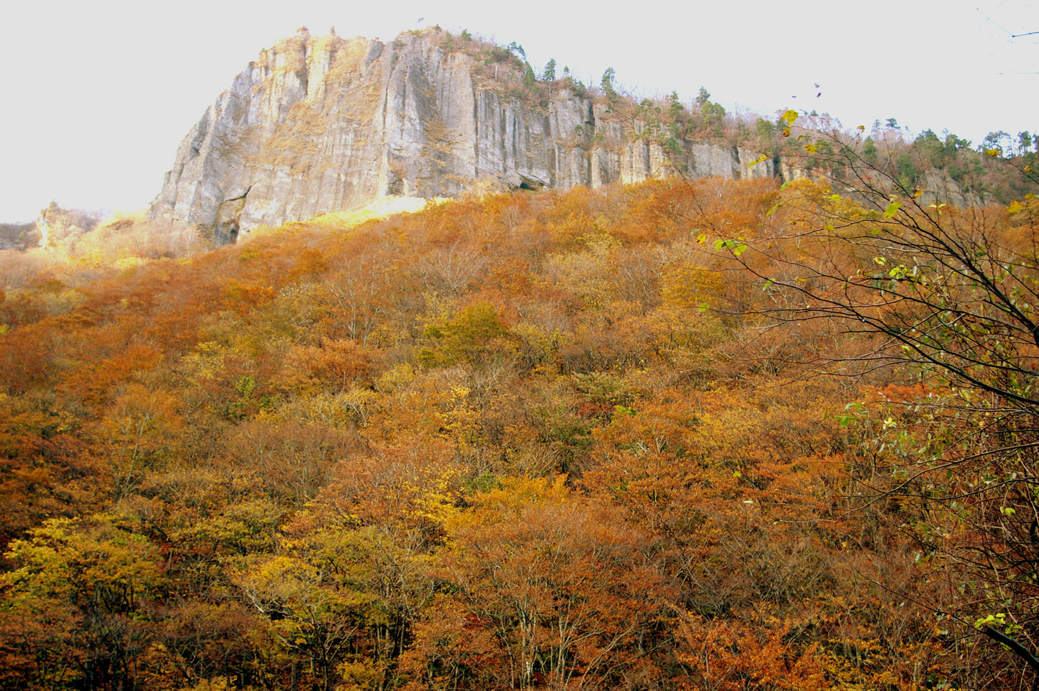 Banji at futakuchi kyokoku.